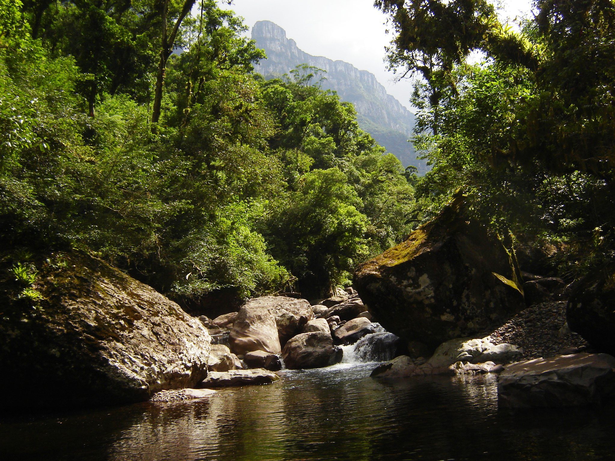 Piscina natural no interior do cânion Fortaleza, a parte do cânion que aparece ao fundo é a mesma que aparece no lado esquerdo da última imagem deste álbum.